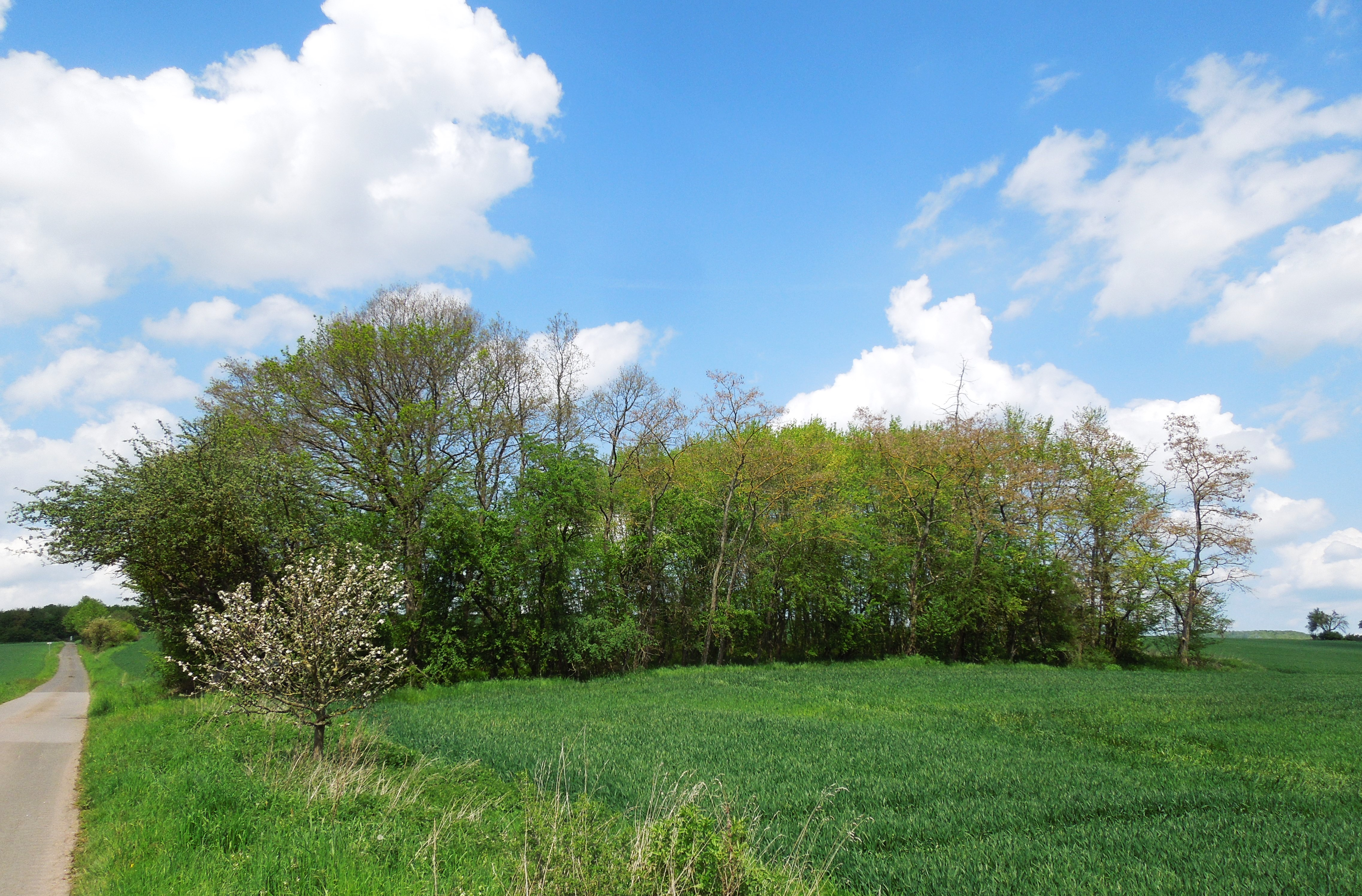 Die die Ruine der Kreuzkirche umgebende Baumgruppe in der Feldflur westlich von Züschen.